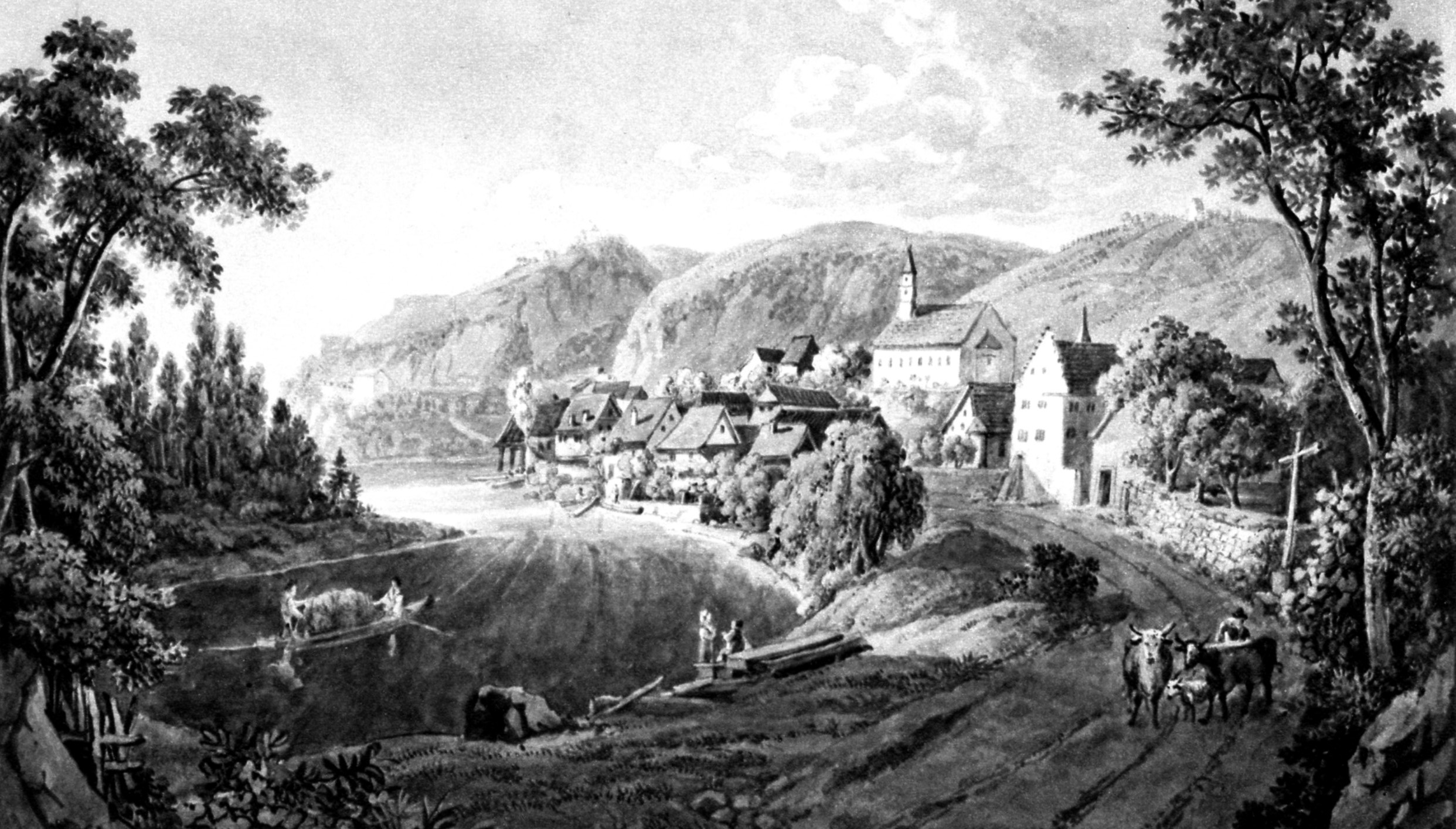 Foto eines Aquarells von P. Birmann mit dem Dorf Istein